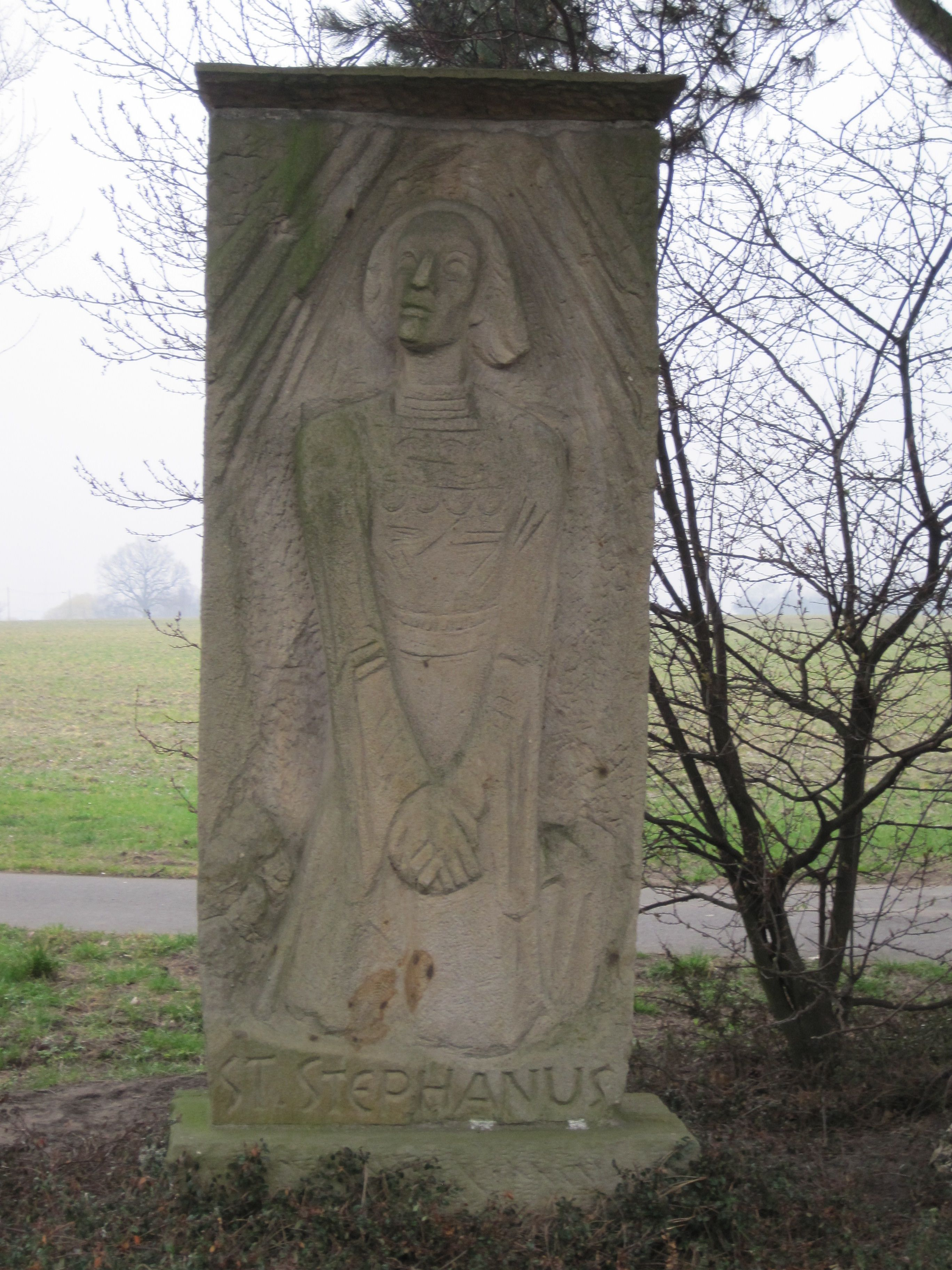 Das Foto zeigt ein Bild des Heiligen Stephanus an der Barsener Straße in Hamm-Bockum-Hövel.